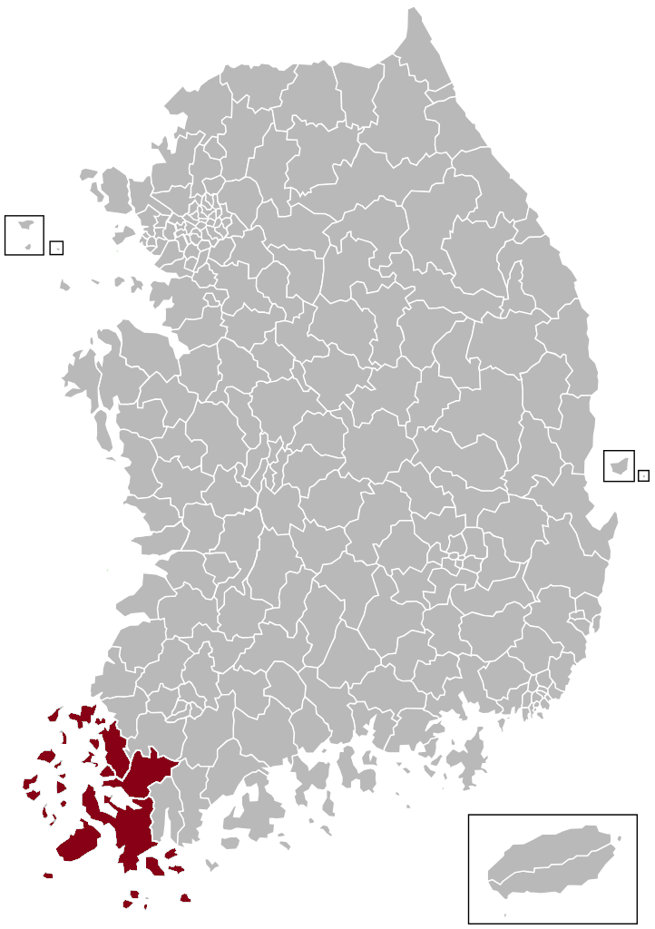 영암우편집중국 관할구역 지도